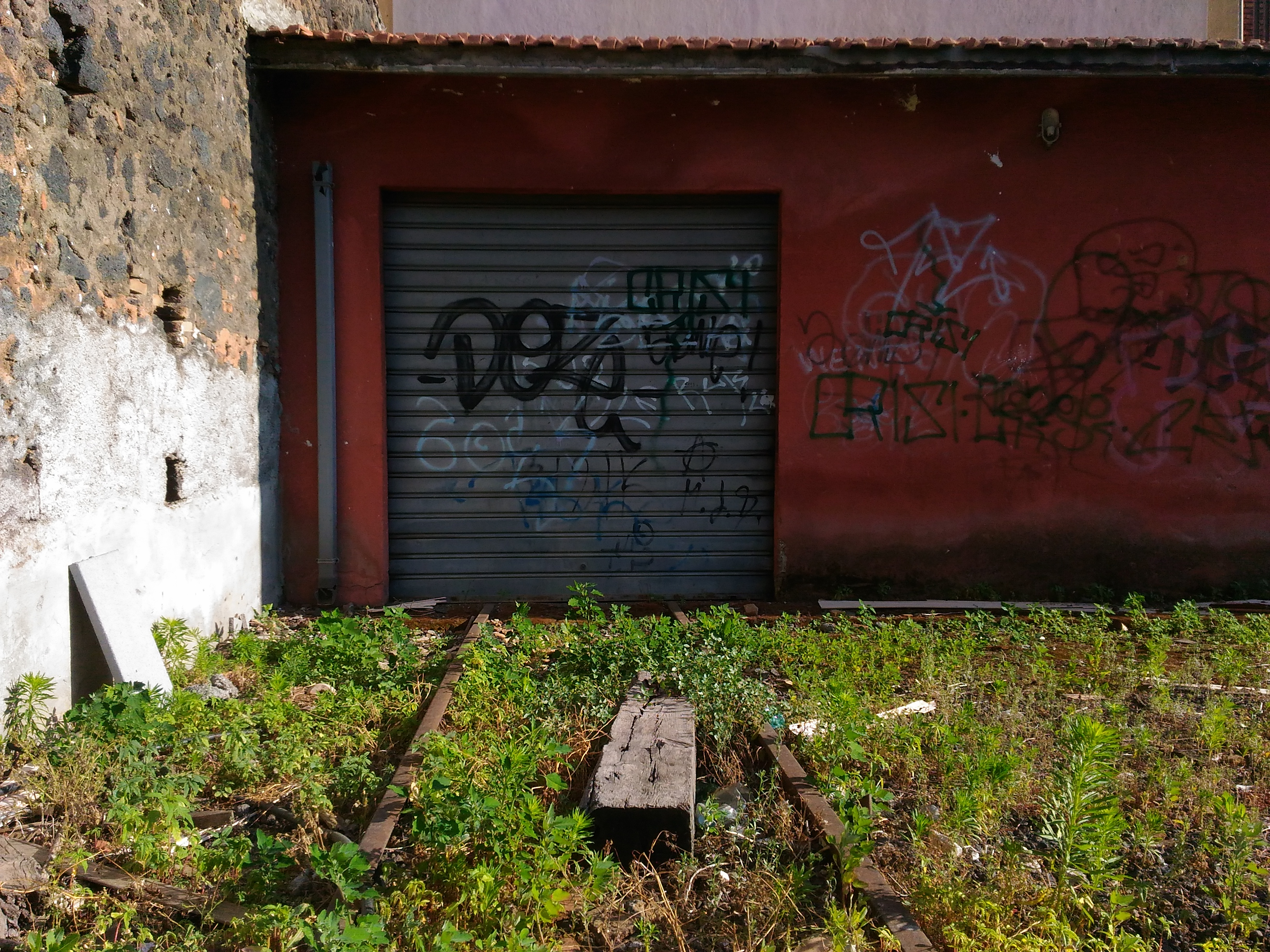 Spezzone di binario usato in passato per entrare nell'edificio speciali rotabili.